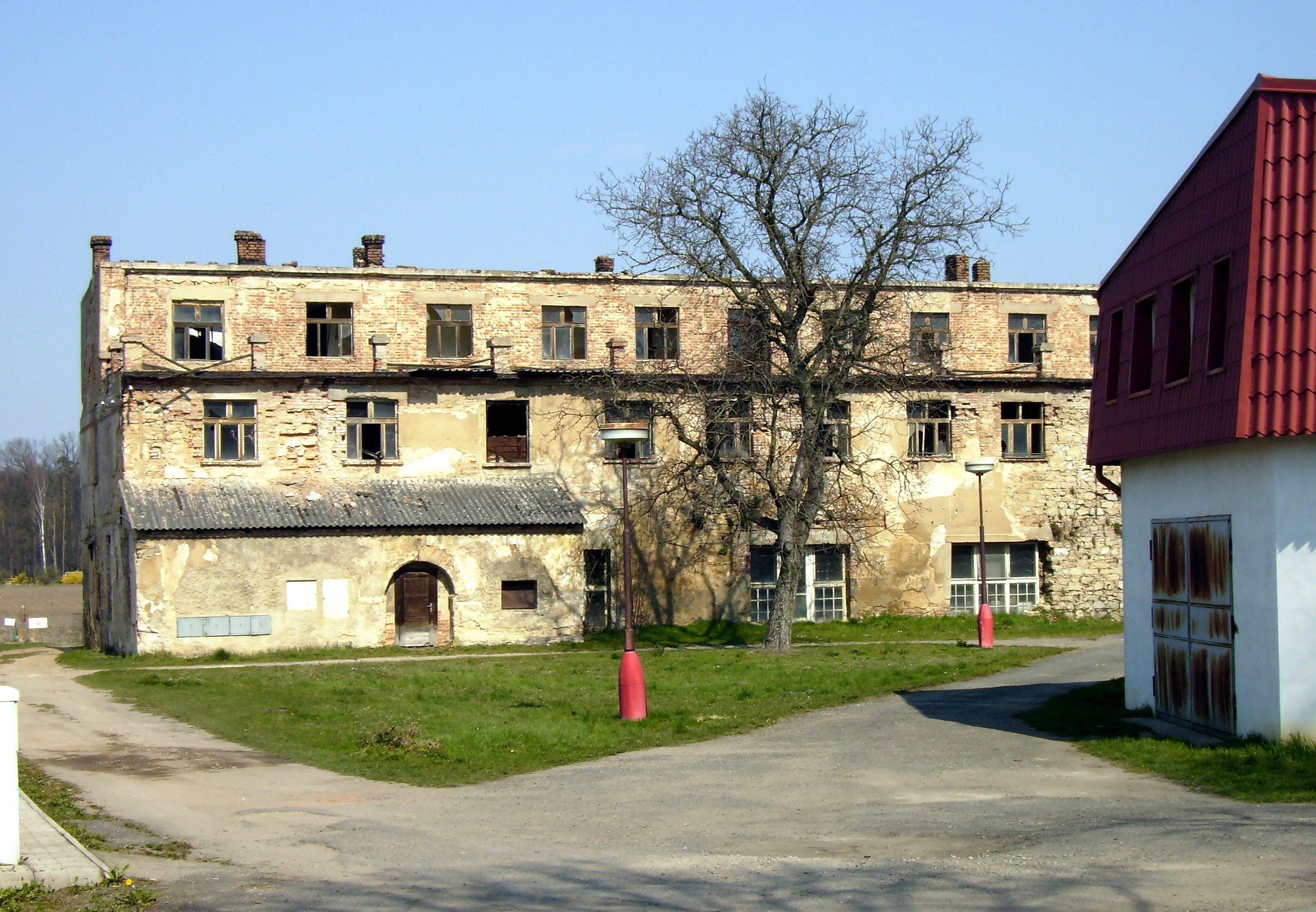 Zdevastovaný pivovar v Přerově nad Labem.